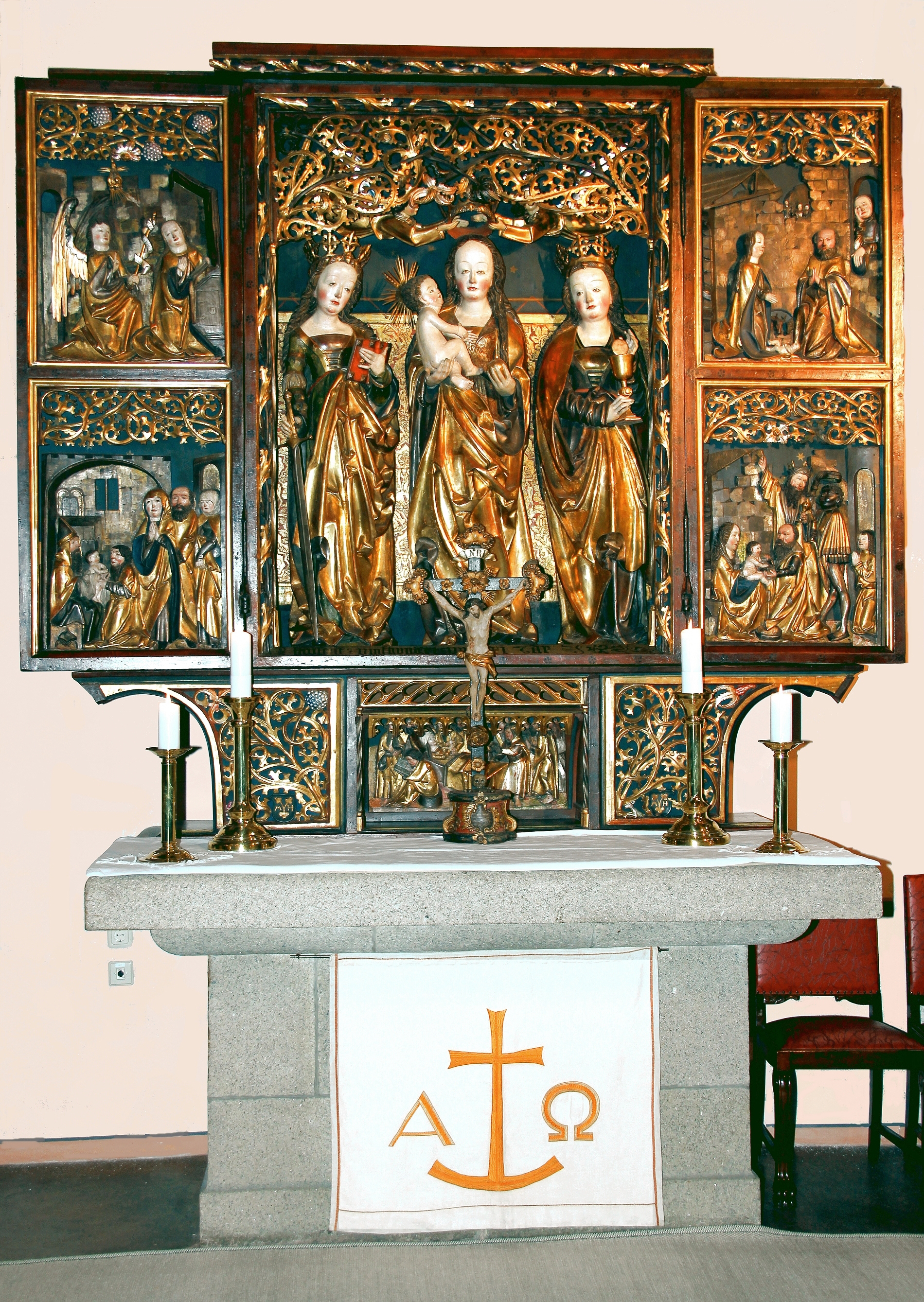 Gesamtansicht des spätgotischen Marienaltars von Michael Heuffner (1511)